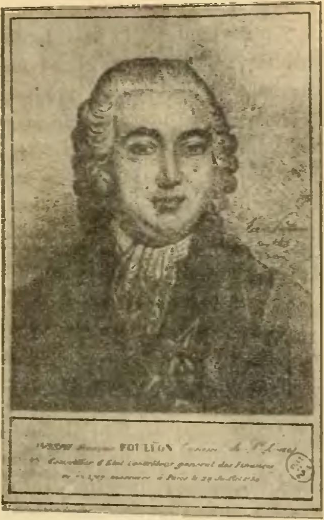 Portrait du fermier-général Foullon dans l'Histoire socialiste de la France contemporaine (tome I). Il est écrit en-dessous "JOSEPH François FOULLON (3 mots indéchiffrables) Conseiller d'État, (conseiller/contrôleur) général des Finances (4 mots indéchiffrables) à Paris le 22 Juillet 1789.